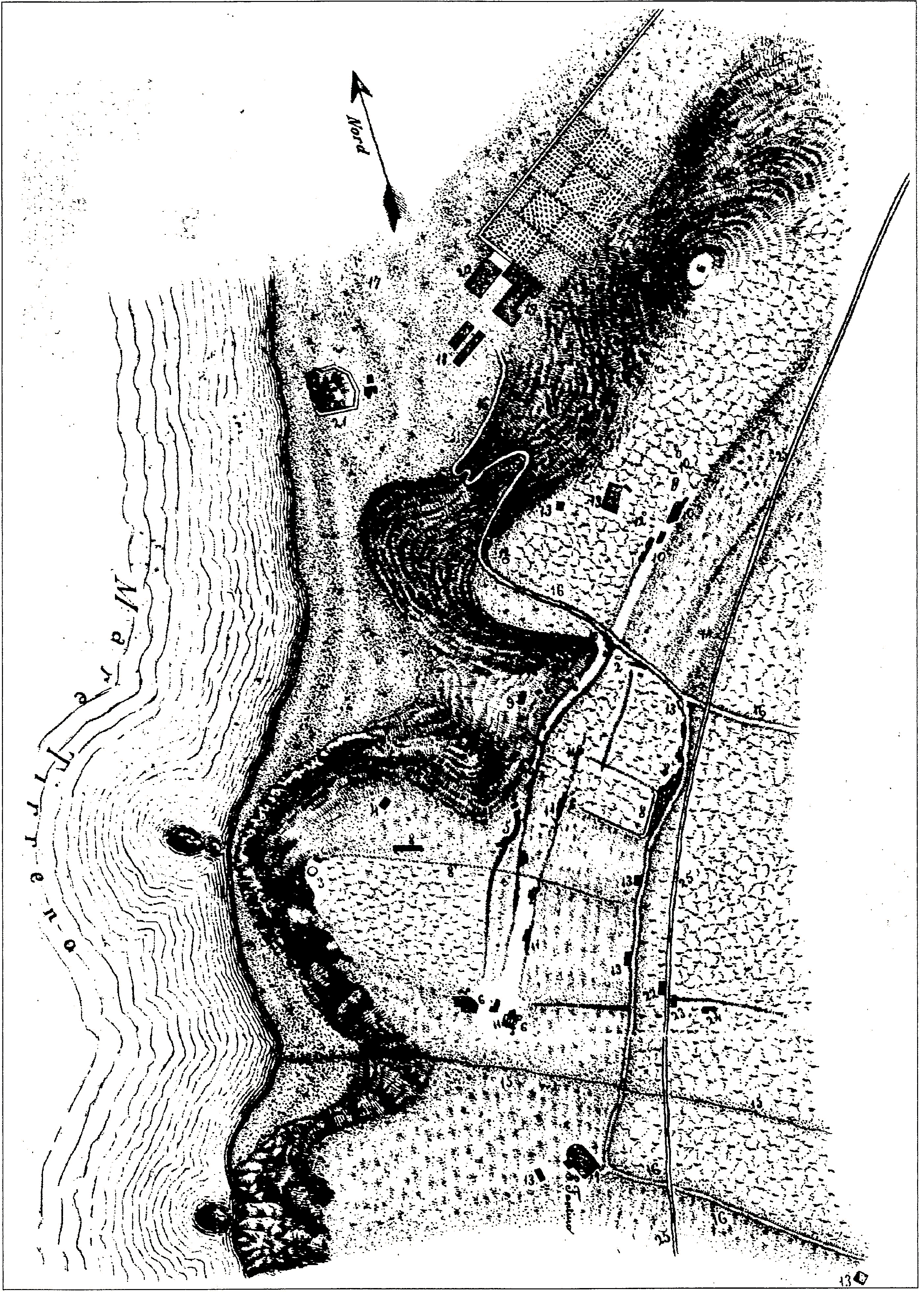 Piante dei ruderi di Tauriana, redatta nel 1886 da Antonio De Salvo nel libro "Tauriana e Metauria".